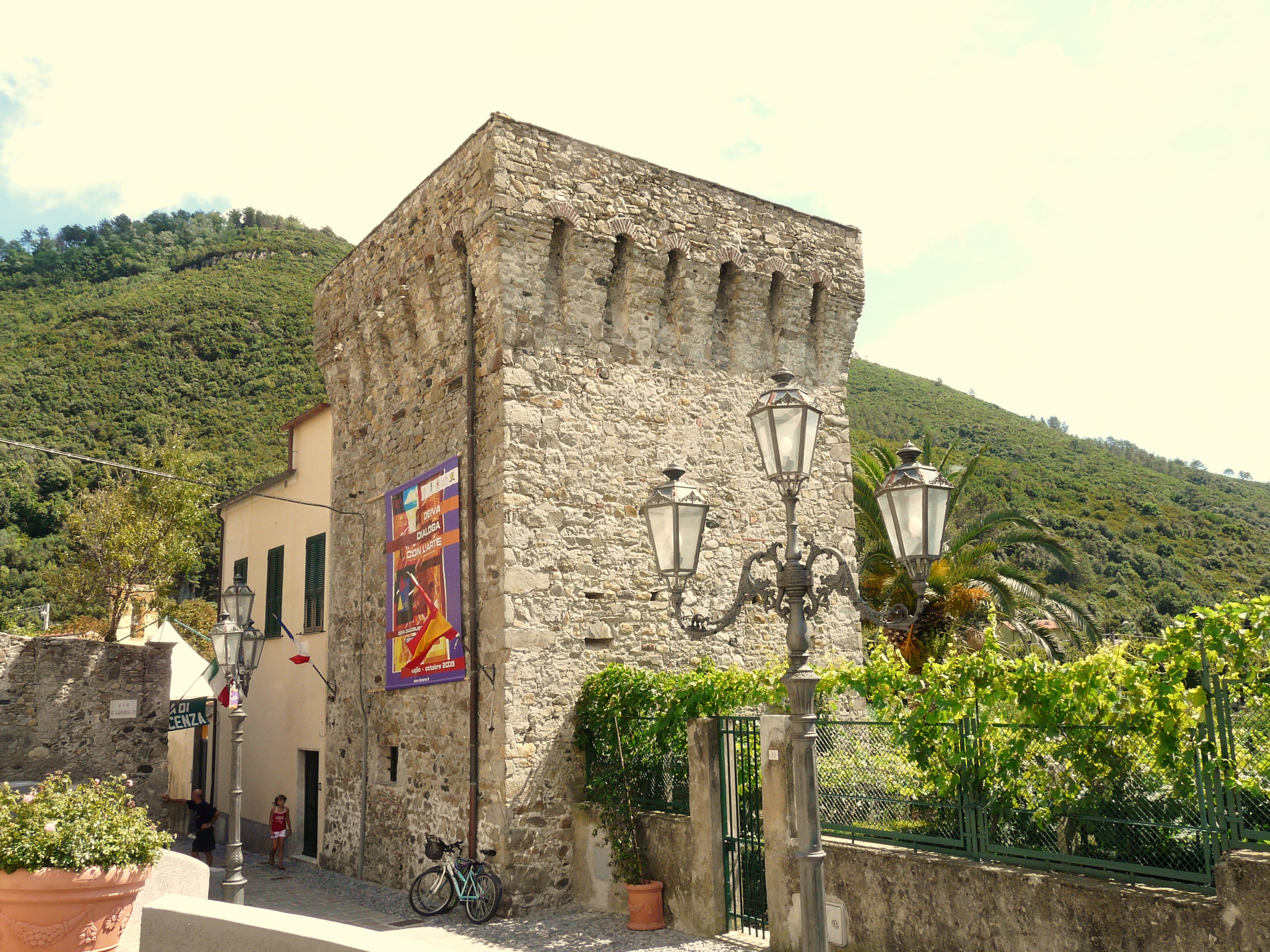 Torre di Deiva Marina, Liguria, Italia